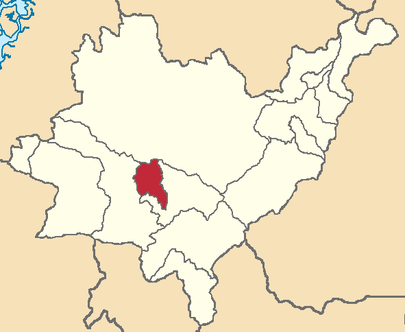 Mapa localizacor del cantón en Azuay, Ecuador